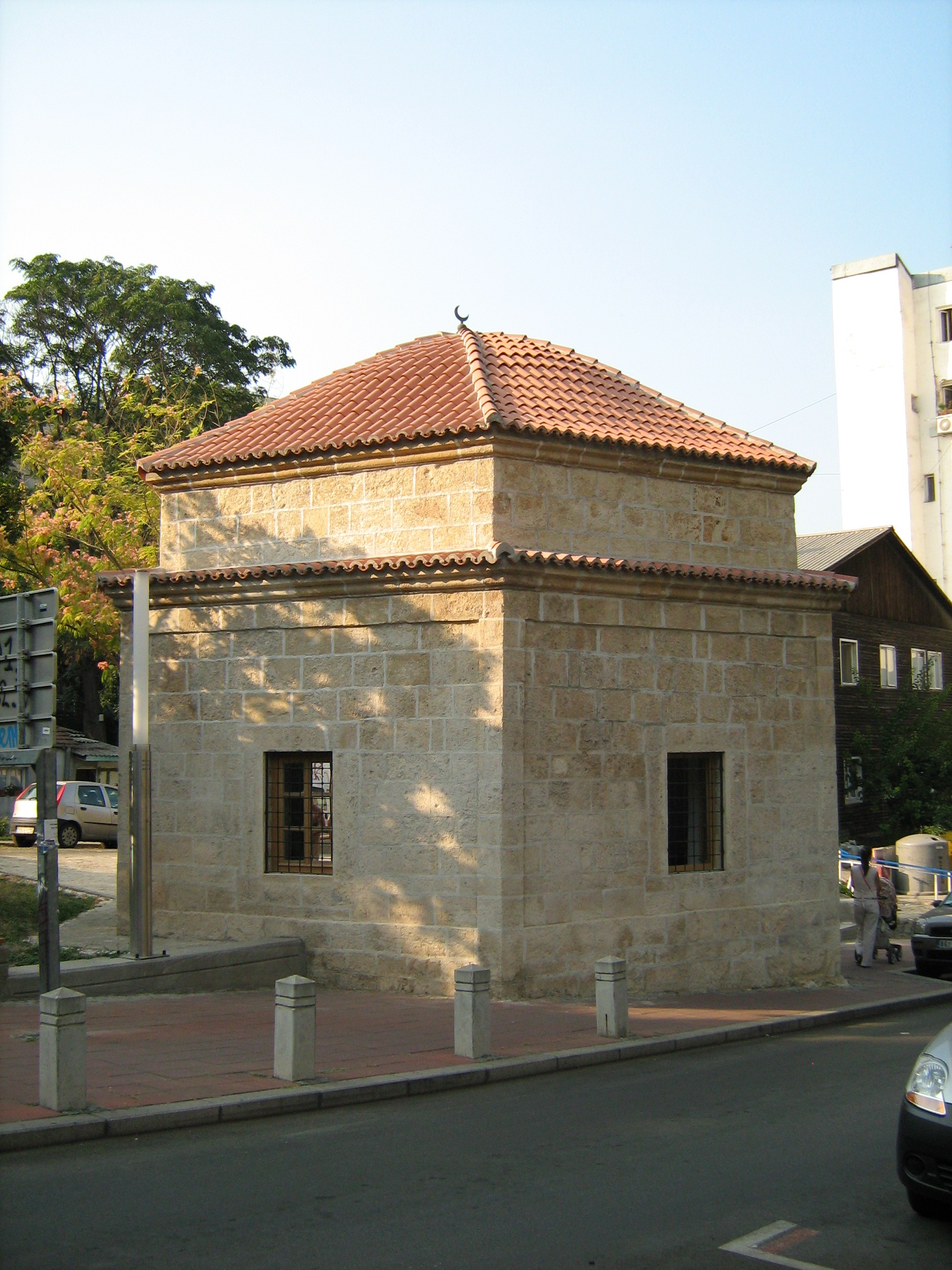 Шејх-Мустафино турбе